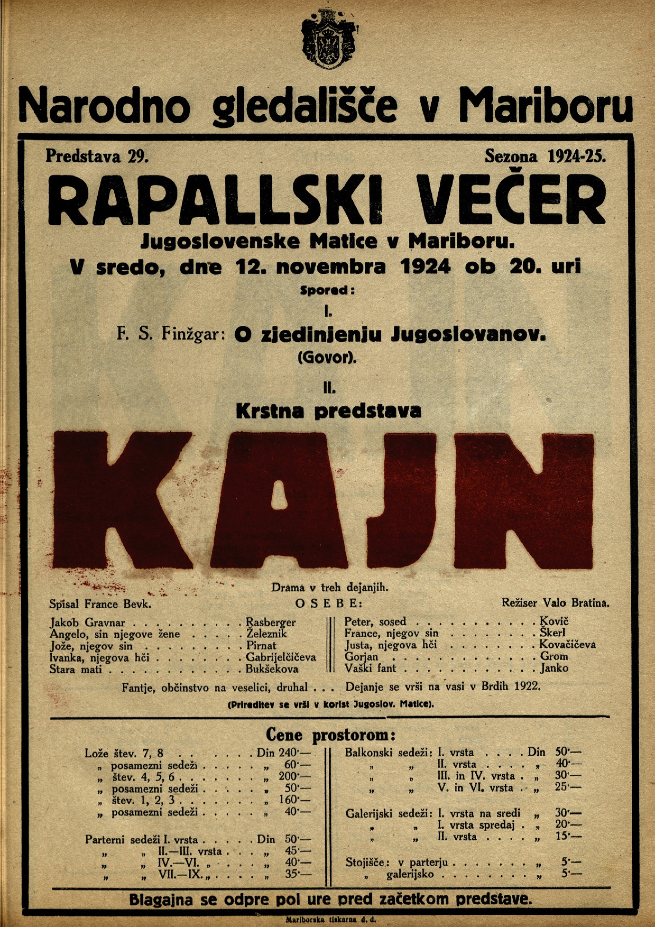 Plakat za predstavo Kajn v Narodnem gledališču v Mariboru.